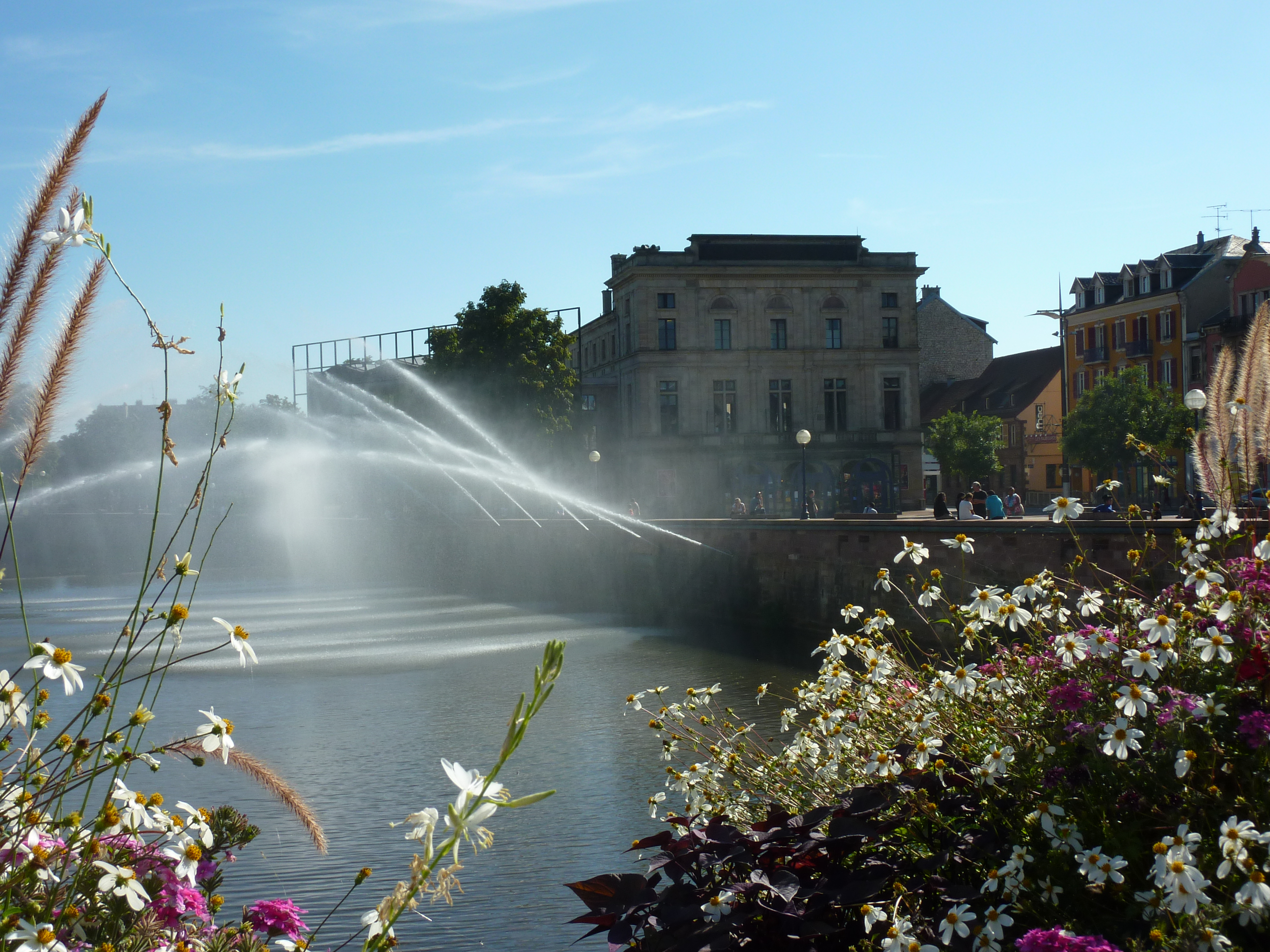 Savoureuse place Corbis à Belfort